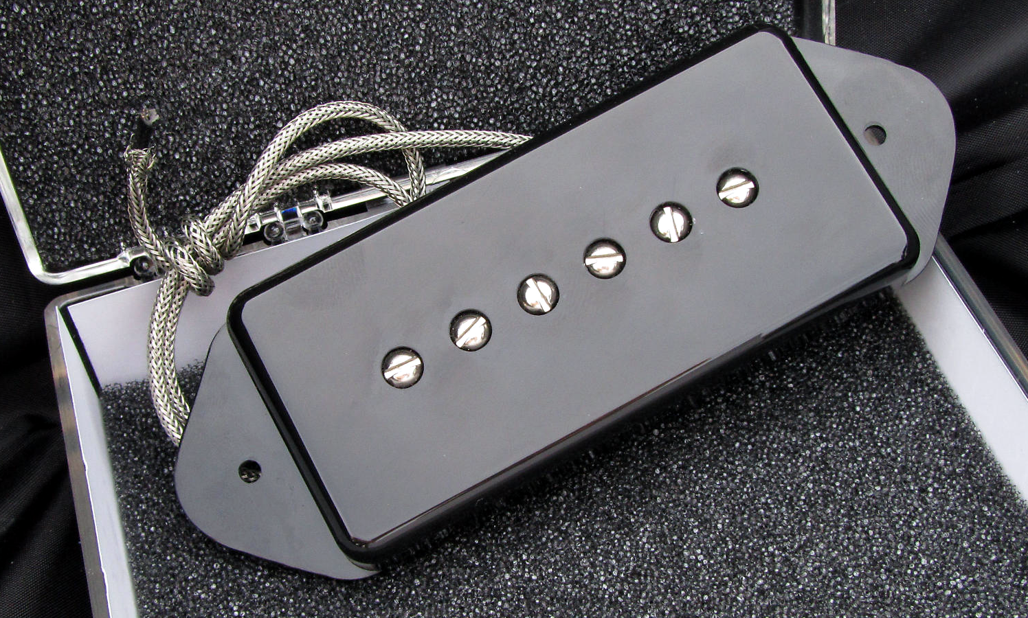 Micro P90 forme "Dogear" (oreilles de chien) de marque Lollar